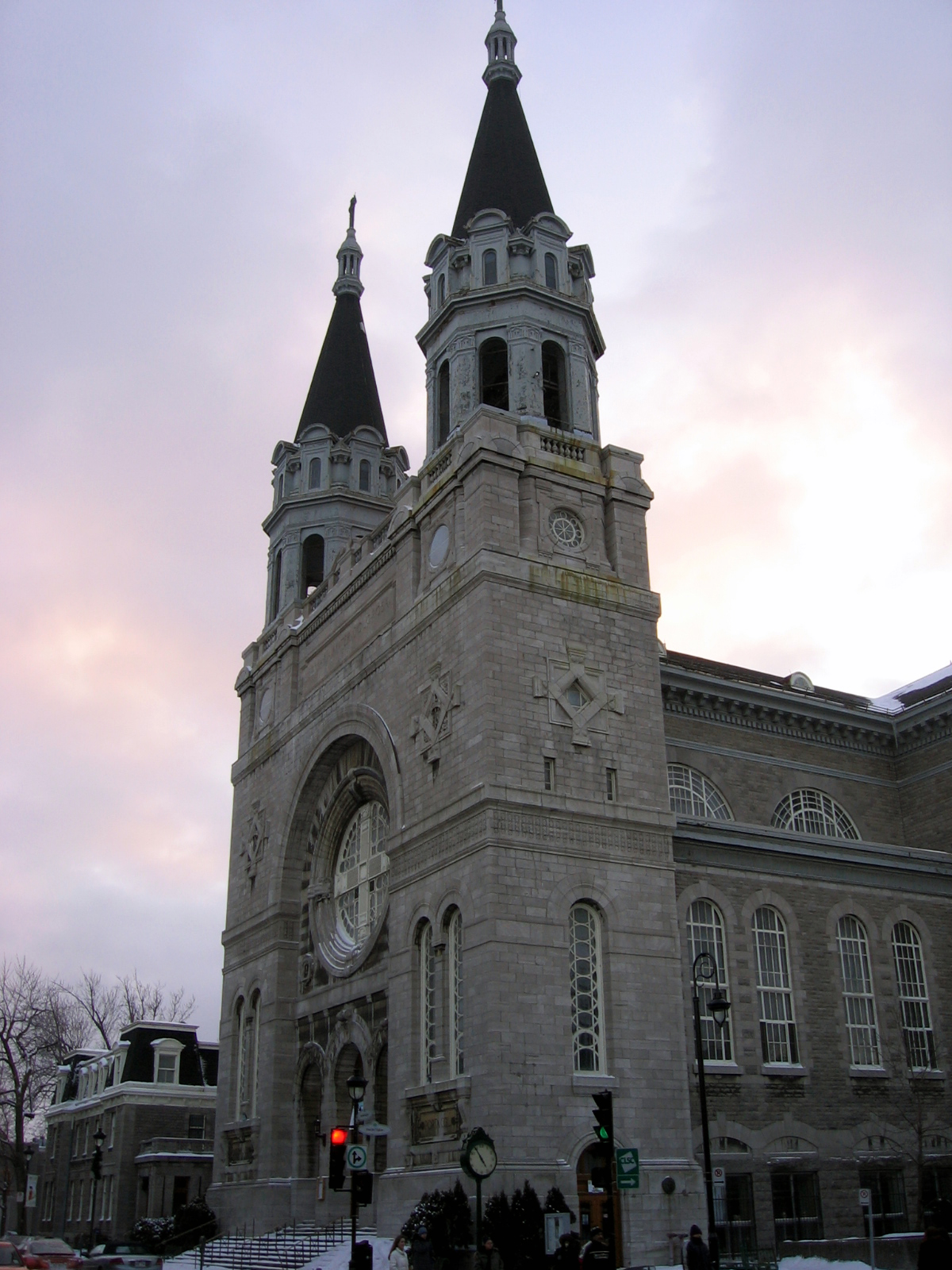 Église Notre-Dame-des-Sept-Douleurs, à Verdun (Montréal)